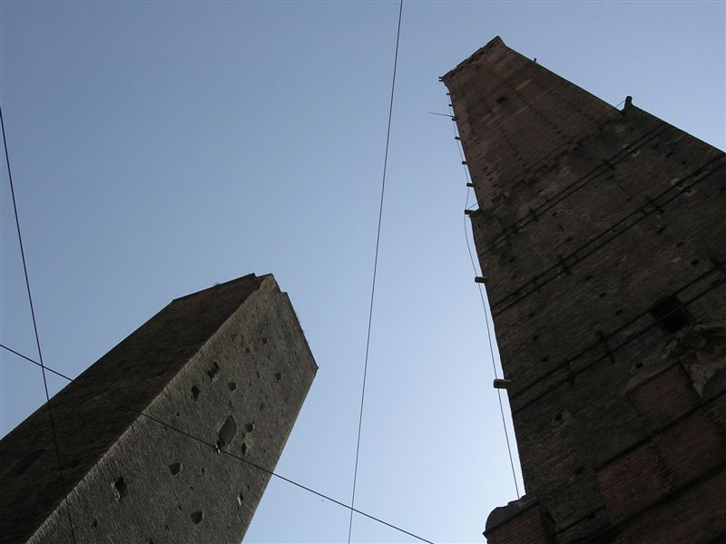 Bologna le due torri (Asinelli e Garisenda). Picture by Paolo Carboni (myself).